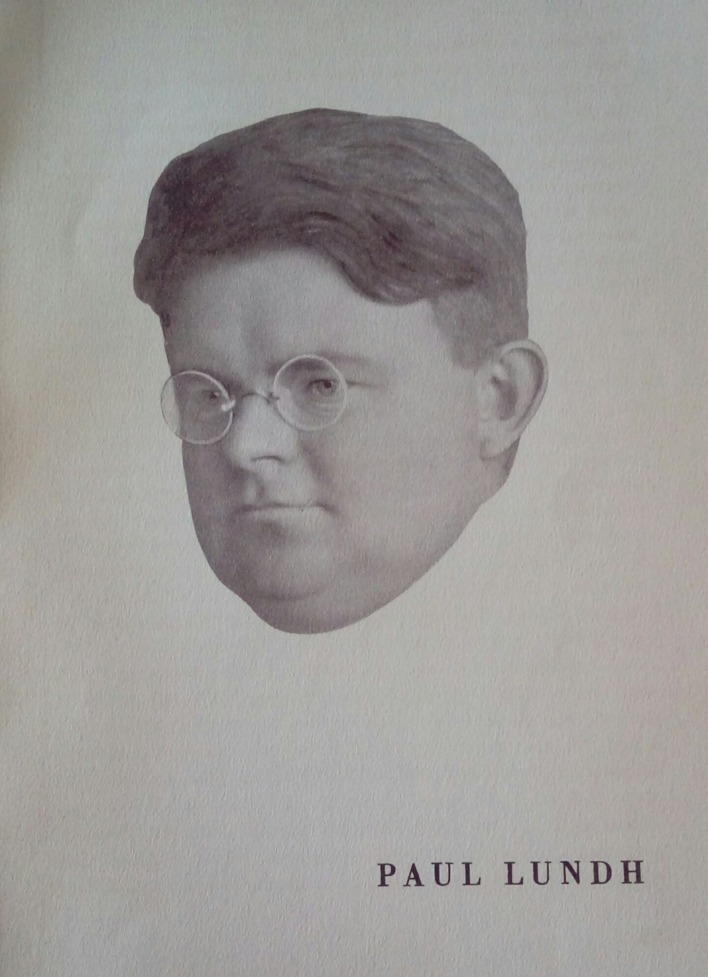 Bild ur antologin Ansikten, Albert Bonniers förlag 1932.